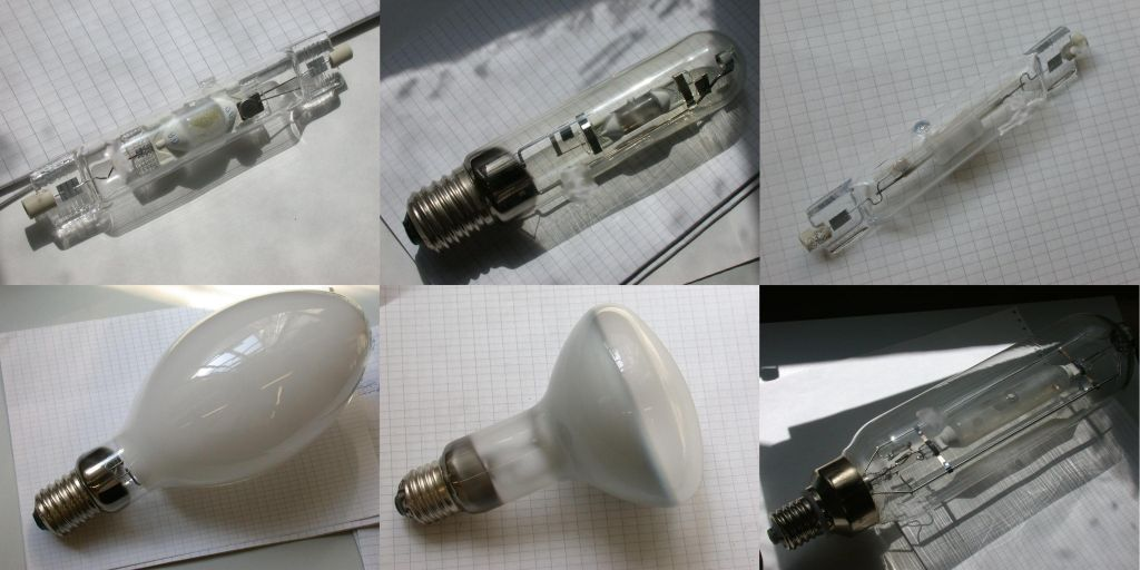 Különböző kivitelű fémhalogén lámpák